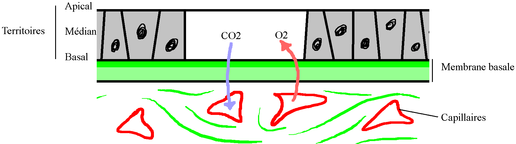 schéma d'un épithélium